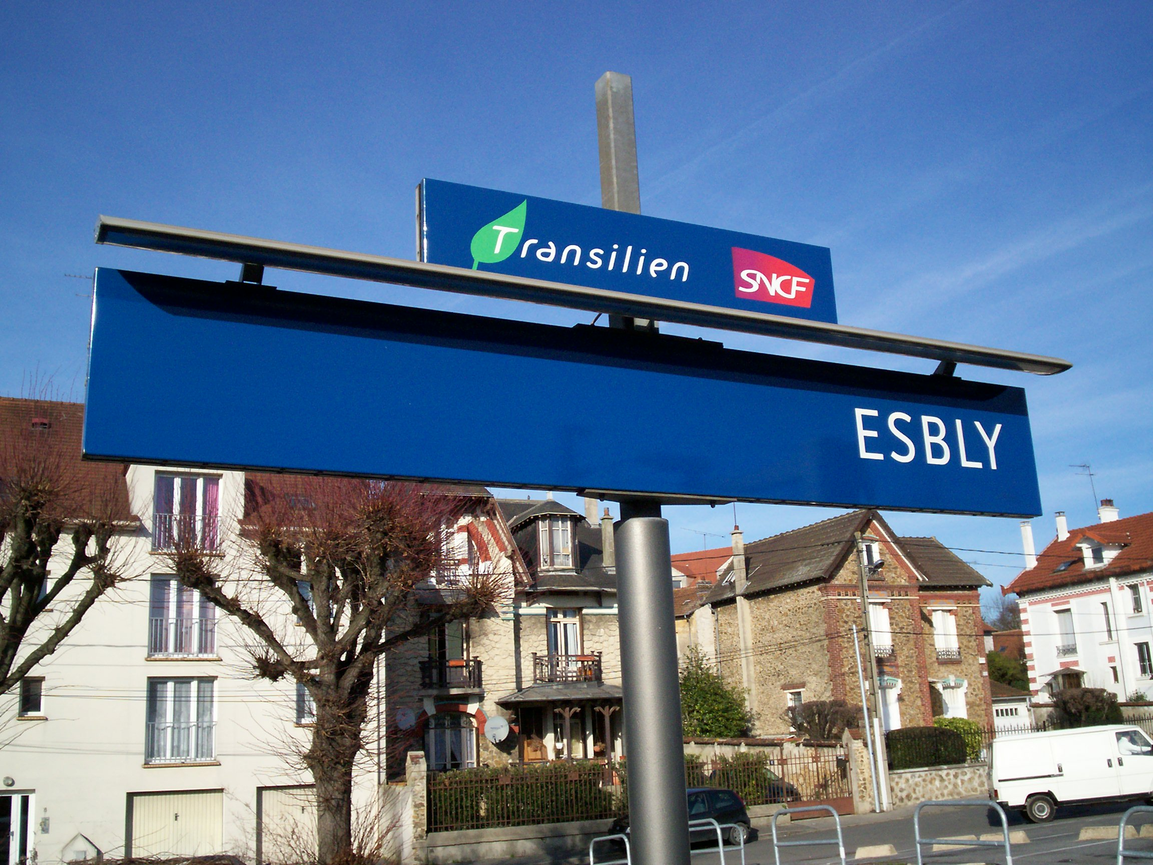 Panneau Transilien à Esbly